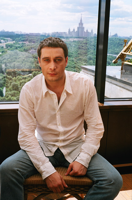 Портрет писателя Эдуарда Багирова.